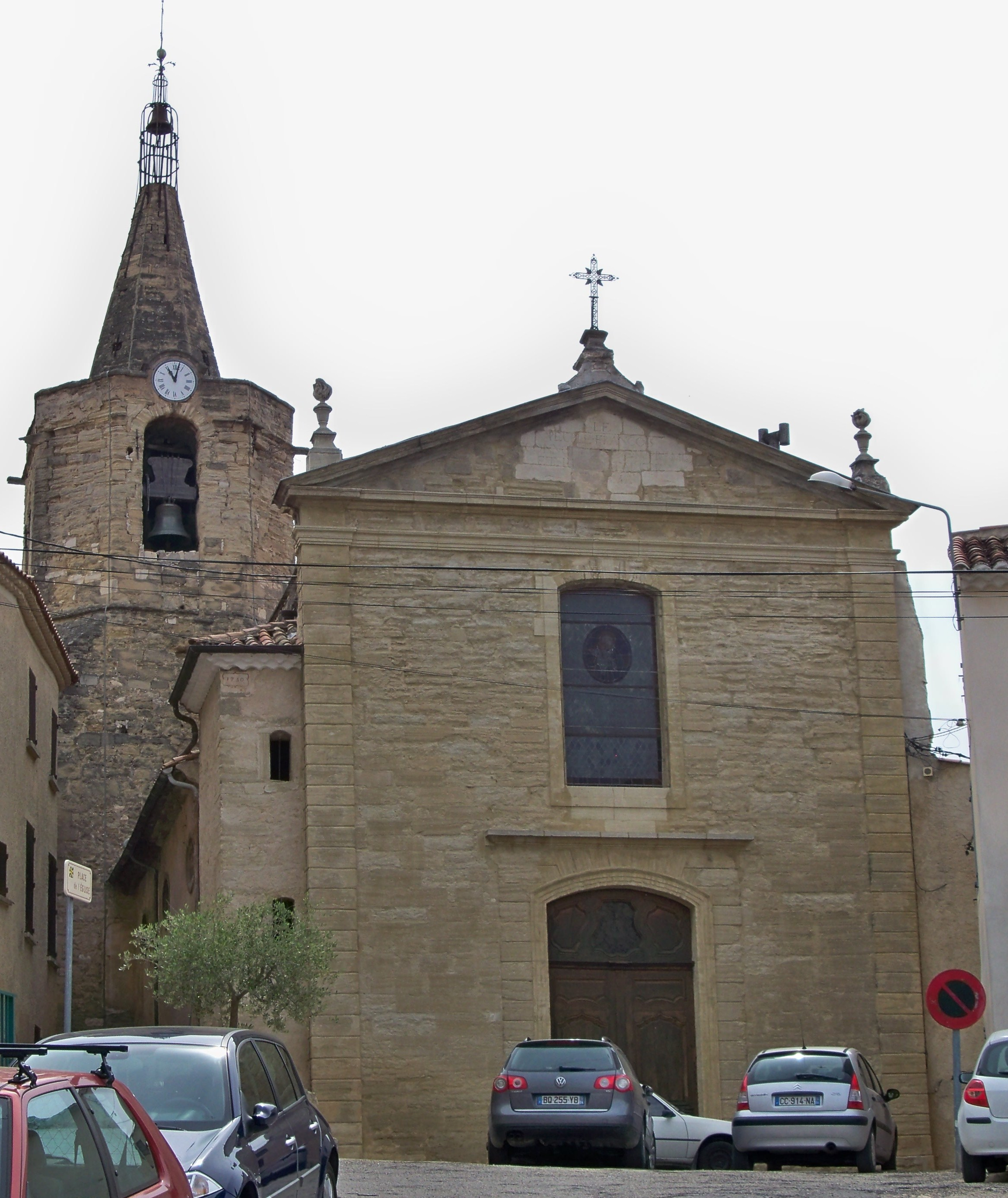 église de Malemort du Comtat (84)